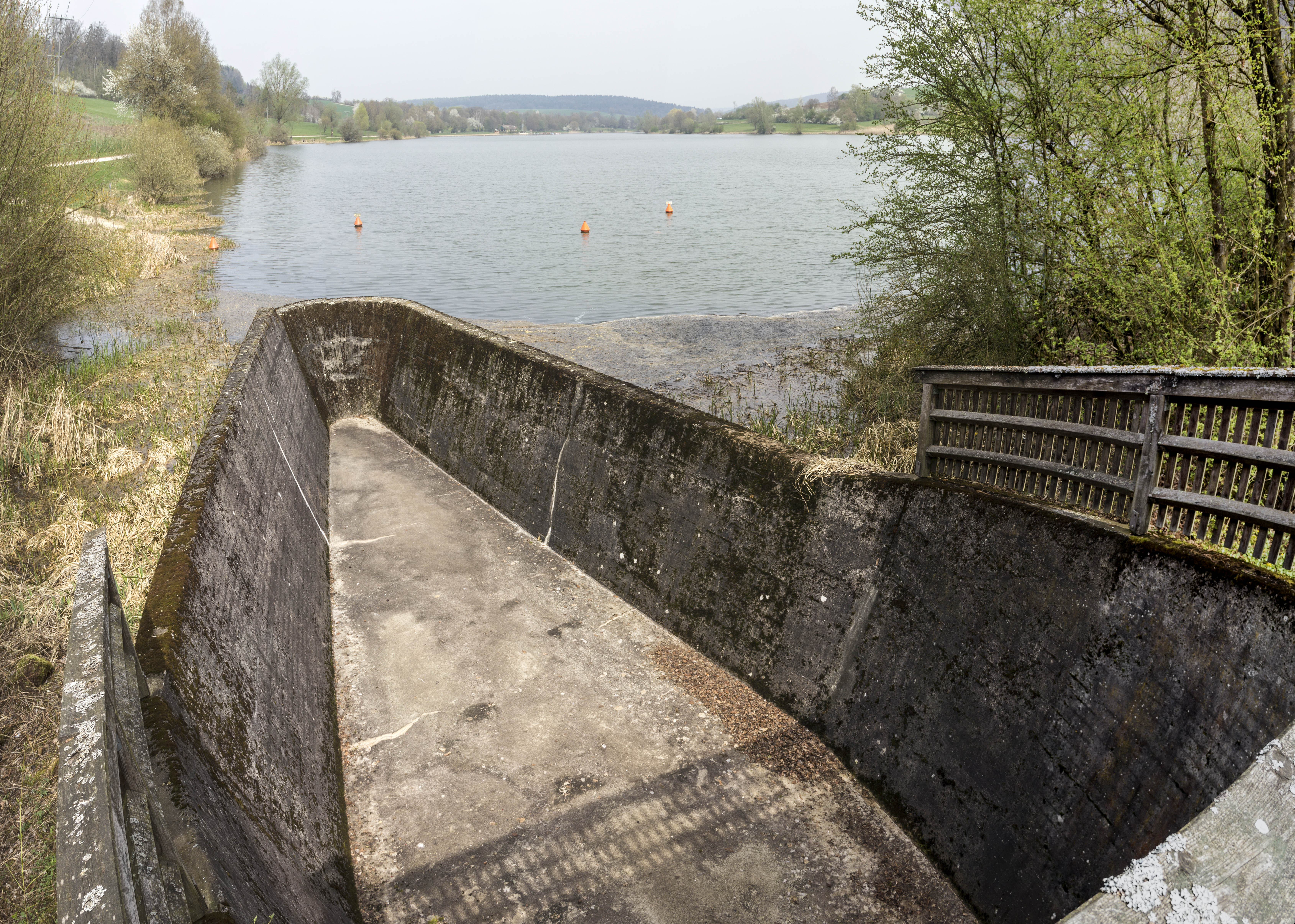 Hahnenkammsee